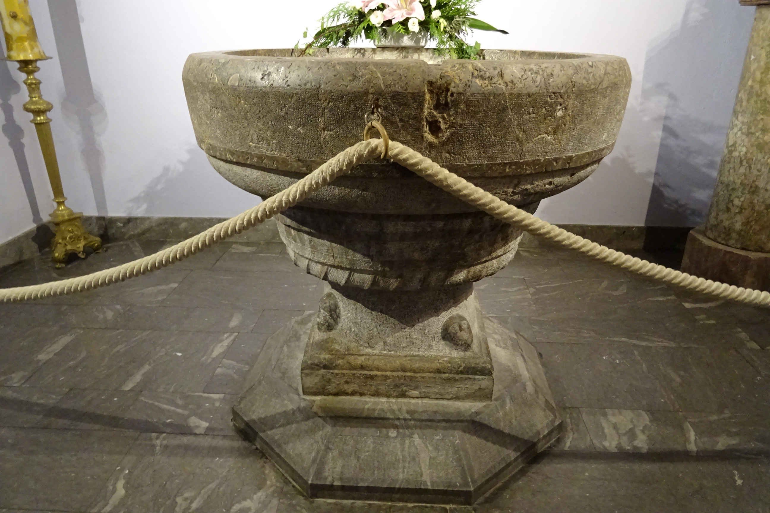 Église paroissiale du Sacré-Cœur de Lourdes : Fonts Baptismaux de l'ancienne église Saint-Pierre